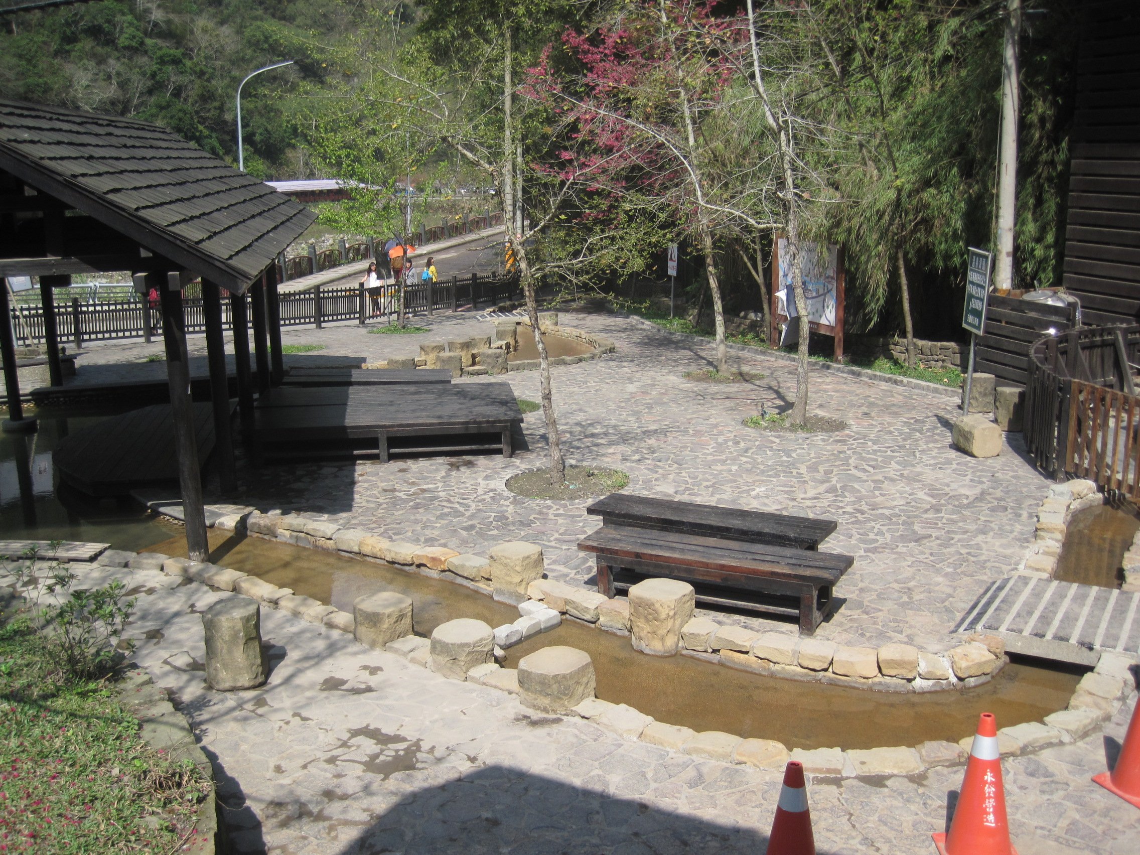 五峰鄉清泉部落的將軍湯；因落石而暫停開放。